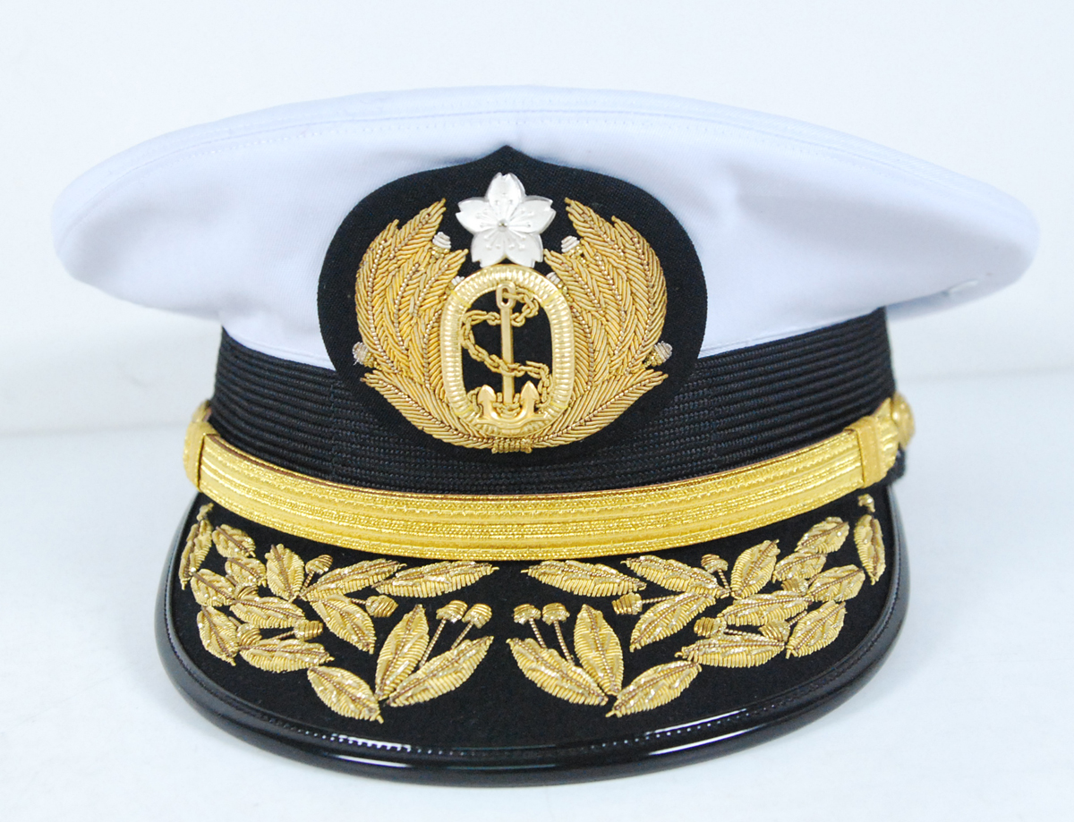 海上自衛隊将官正帽